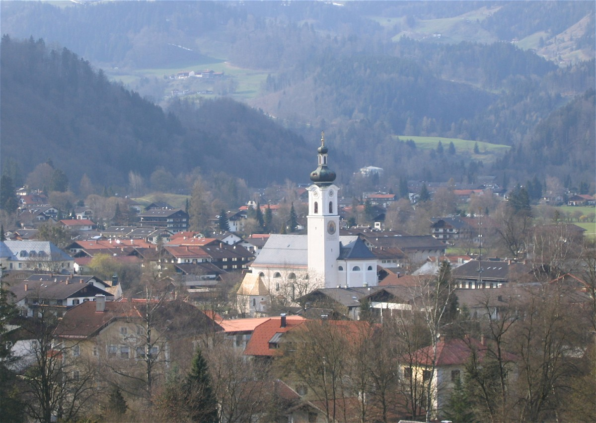 Oberaudorf, Pfarrkirche